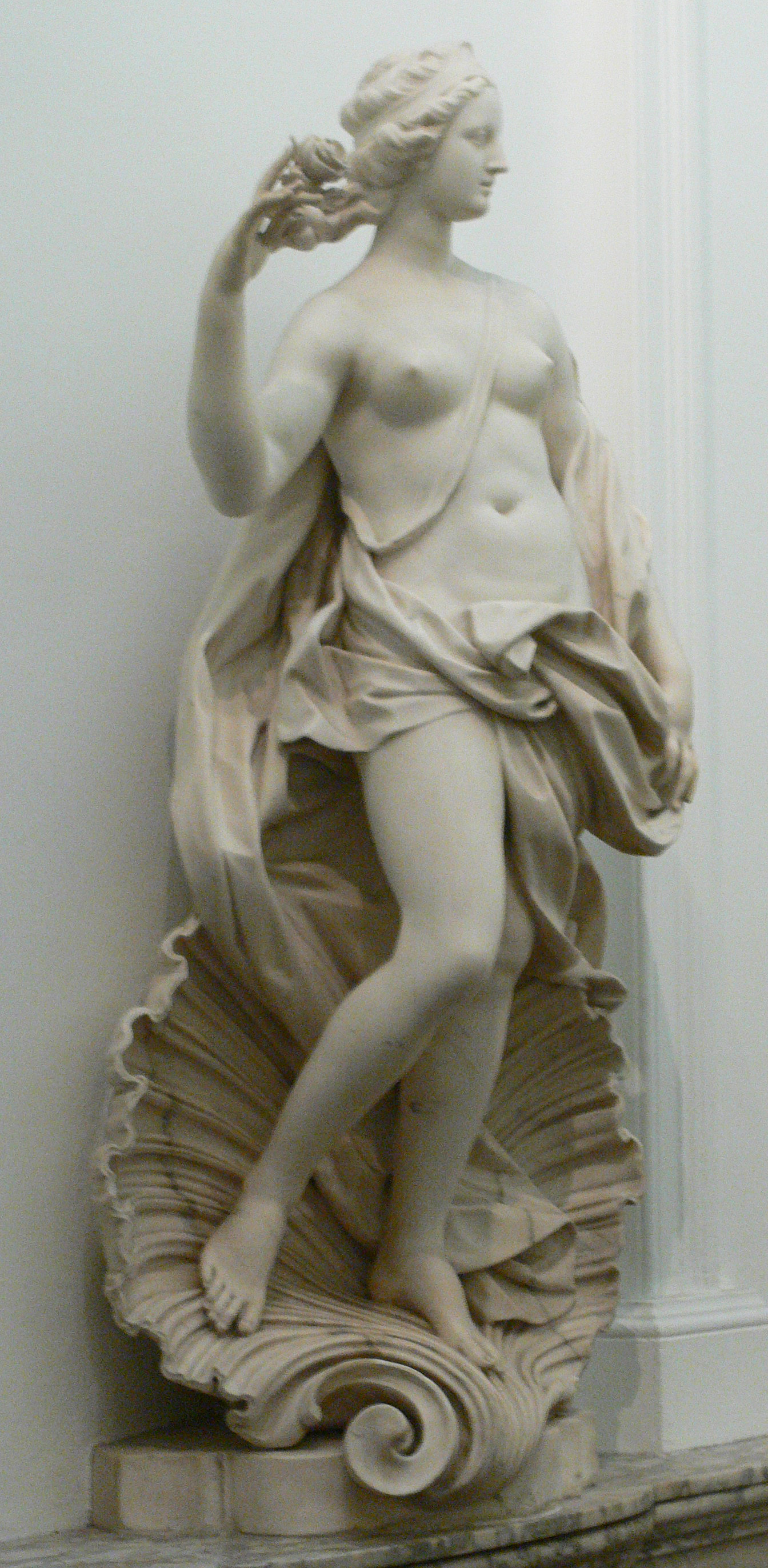 Museum Willet-Holthuysen, à Amsterdam